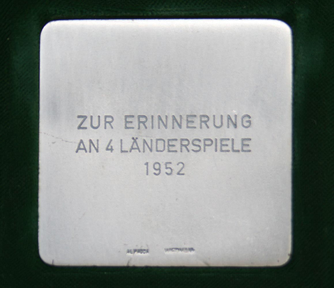 DFB-Medaille, Rückseite